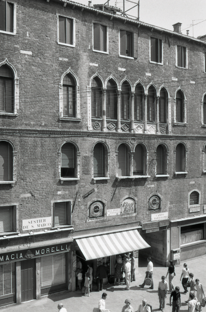 Serie fotografica : Venezia, 1969 / Paolo Monti. - Strisce: 7, Fotogrammi complessivi: 38 : Negativo b/n, gelatina bromuro d'argento/ pellicola ; 35 mm. - ((I fotogrammi hanno una doppia numerazione. . - Sul portanegativi: Nikon Agfa 21. - All'interno del portanegativi Monti specifica alcuni soggetti. - Fonte: Agenda di Paolo Monti: Monti - Agenda 1969 (1969), presso Archivio Paolo Monti